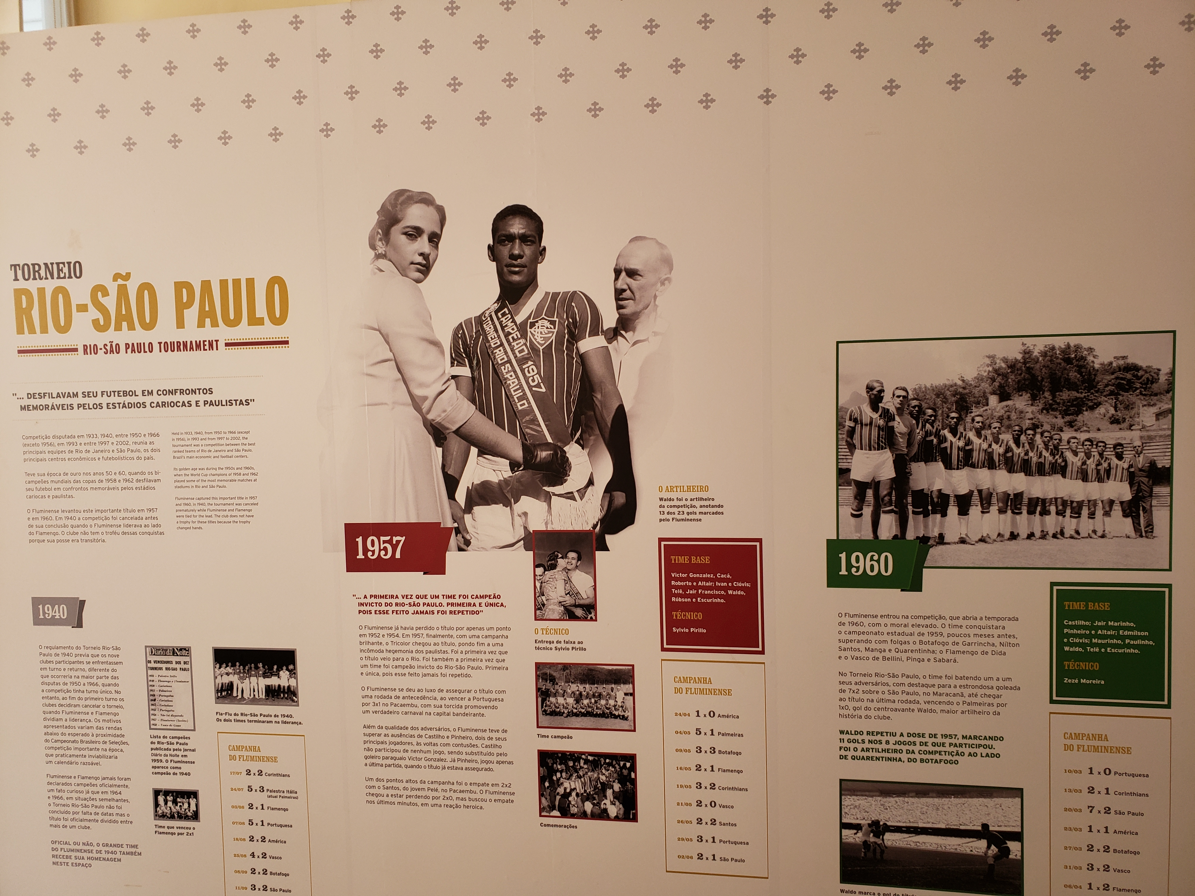 Painel do Torneio Rio-São Paulo na Sala de Troféus do Fluminense Football Club.